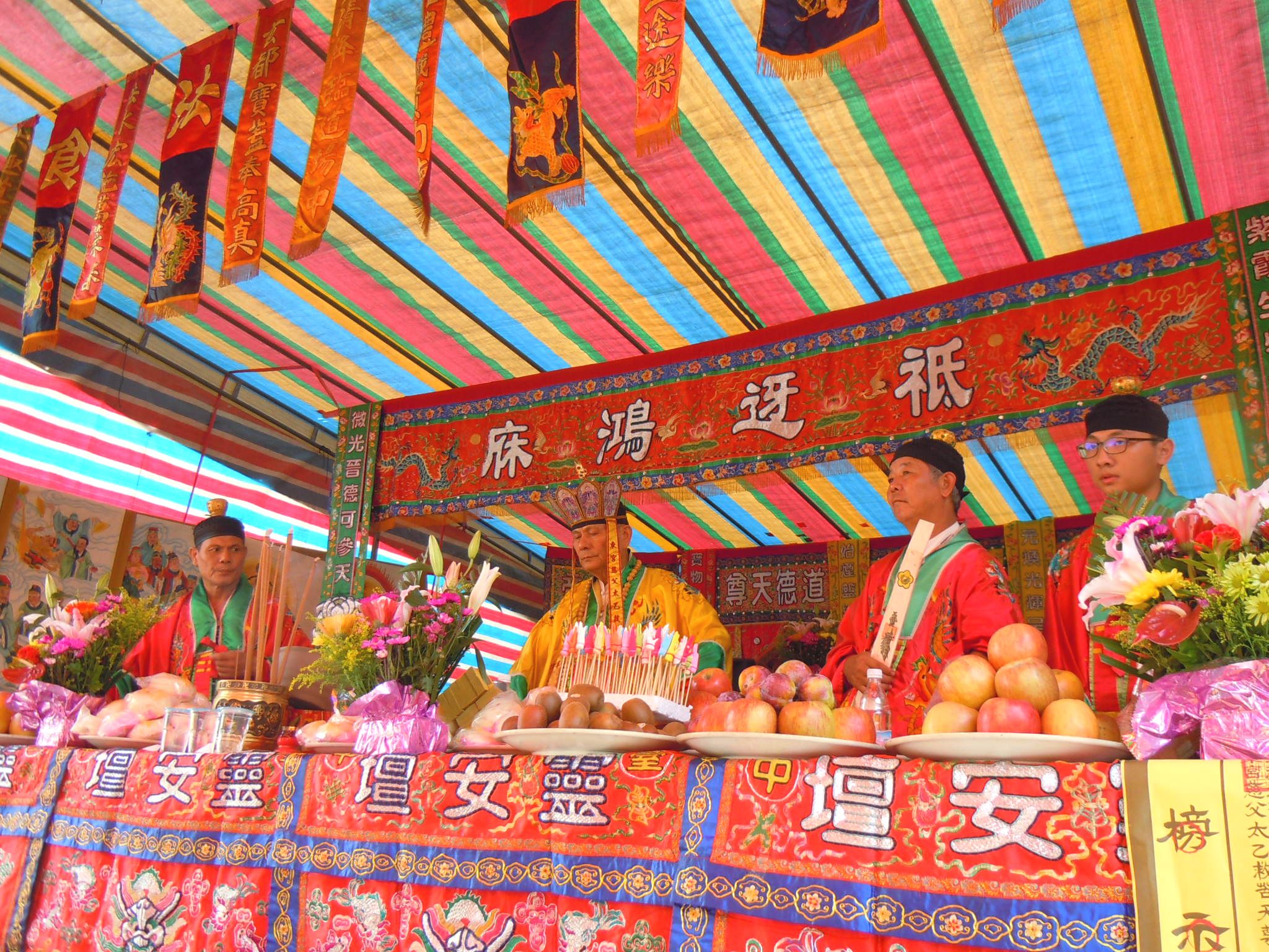 臺中市西屯區何安里何厝街119號－臺中靈安壇。